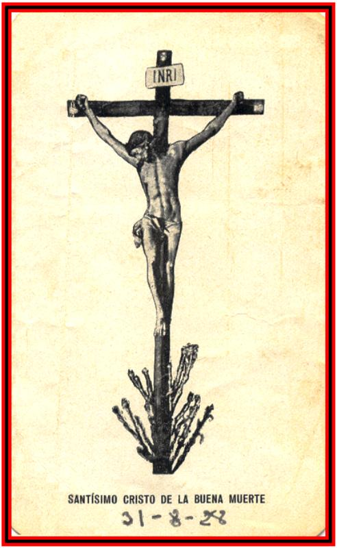 1ª tirada estampa del Cristo de la Buena Muerte de Alicante. Dª Balbina Gomiz y Poveda